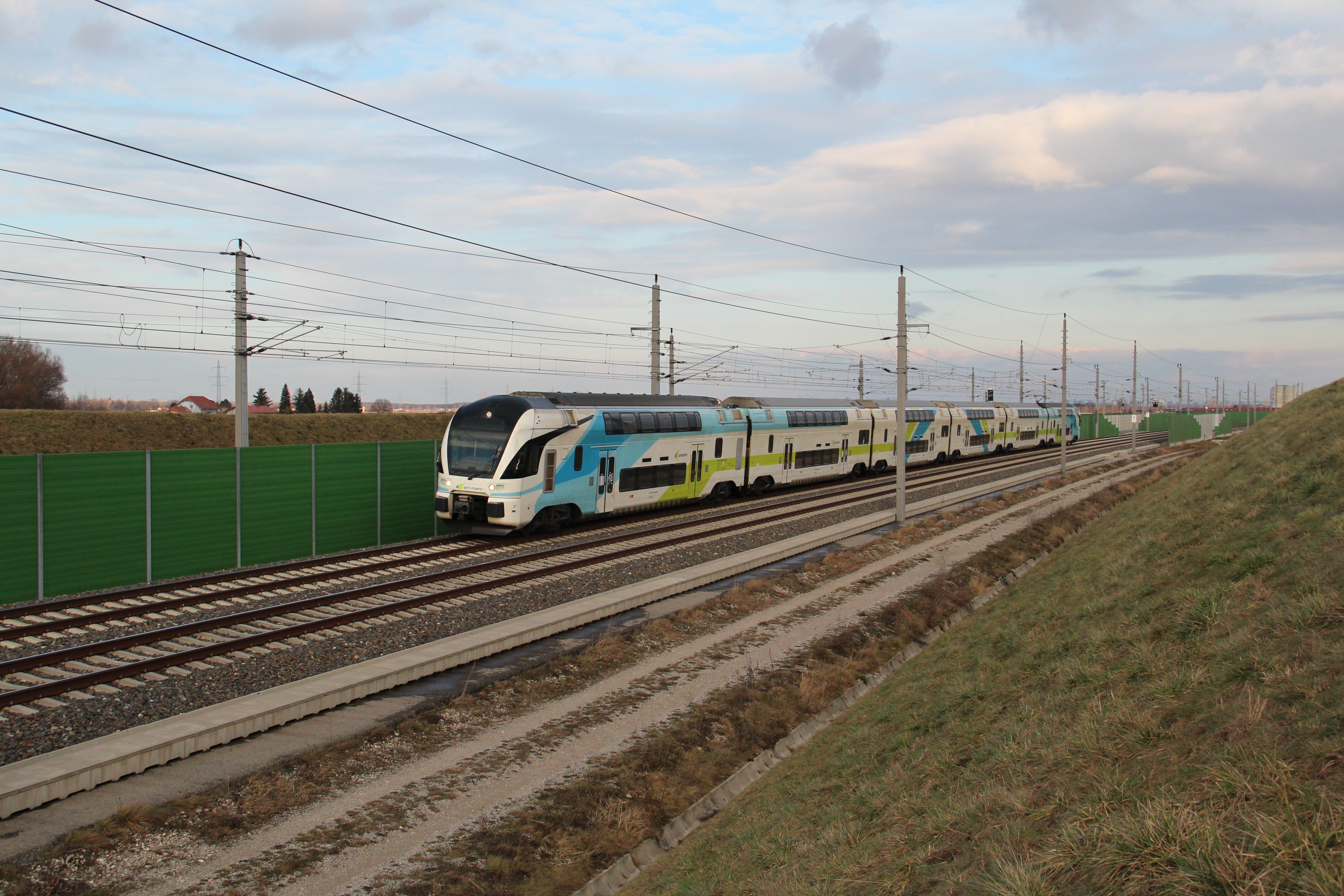 Ein Zug der WESTbahn am Weg nach Freilassing kurz nach dem Bahnhof Tullnerfeld, unweit der Haltestelle Michelhausen